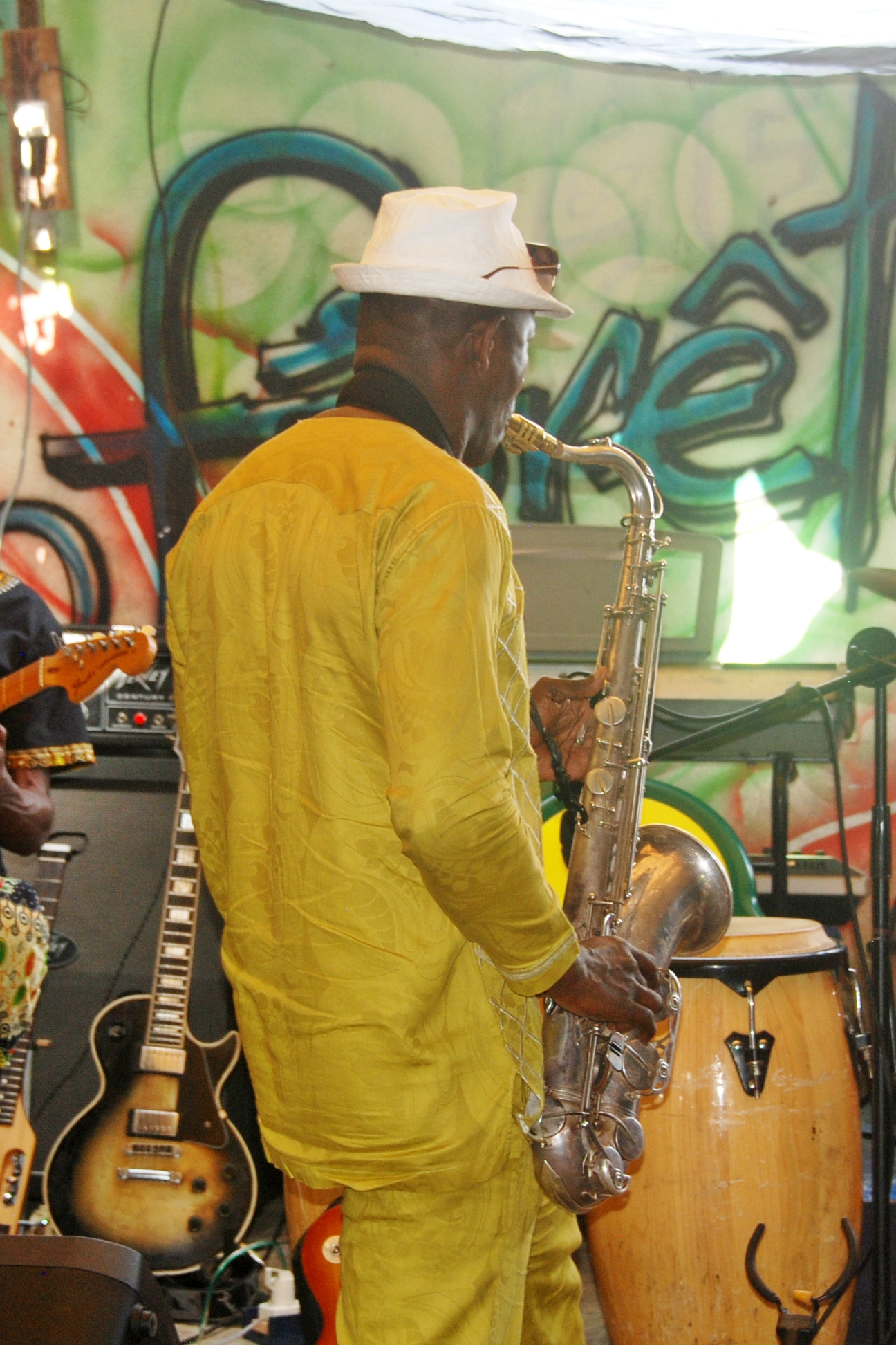 un saxophoniste ivoirien en pleine prestation à Abidjan This is an image of "African people at work" from Ivory Coast